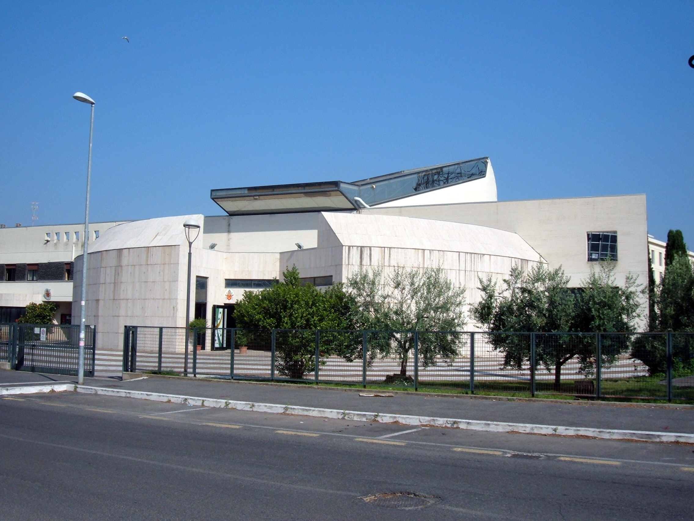 Chiesa dei Santi Aquila e Priscilla, a Roma, nel quartiere Portuense.